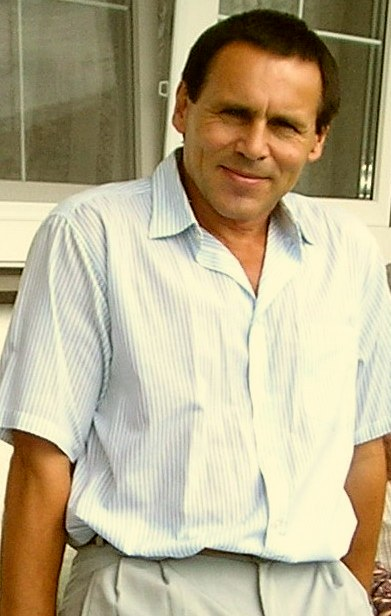 Jan Skorkovský, Praha, červen 2005